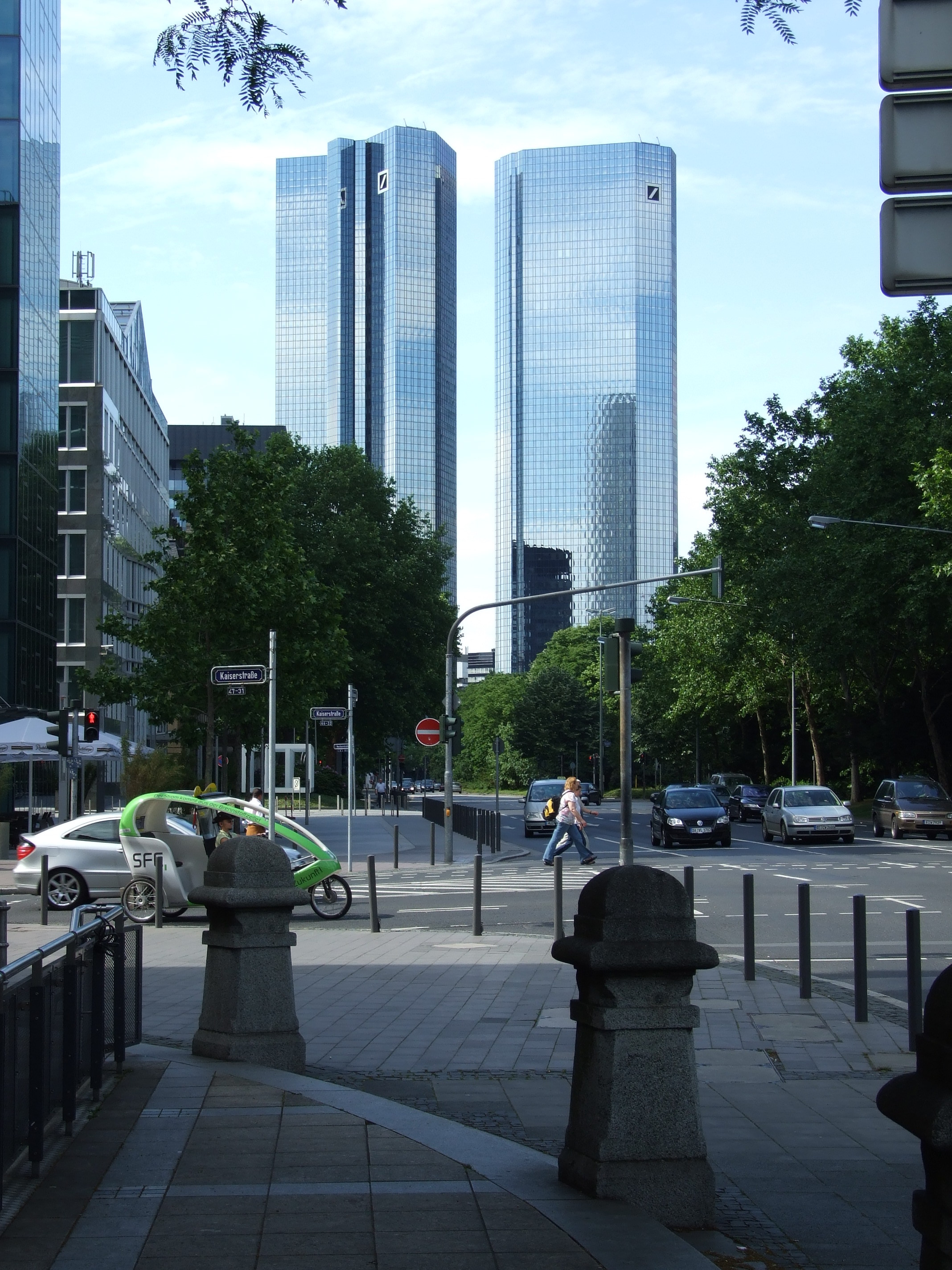 Deutsche Bank, Zentrale und Verwaltung